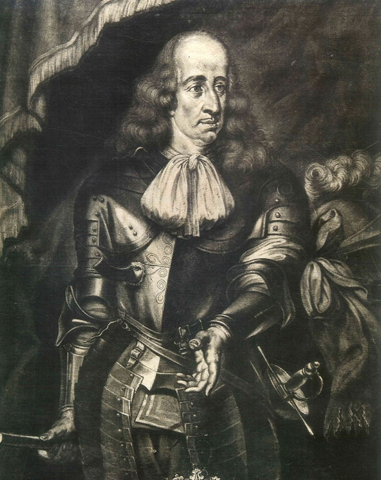 Retrato de Gaspar de Haro, VII marqués del Carpio. Arnold Van Westerhout (grabador). Madrid, Biblioteca Nacional.